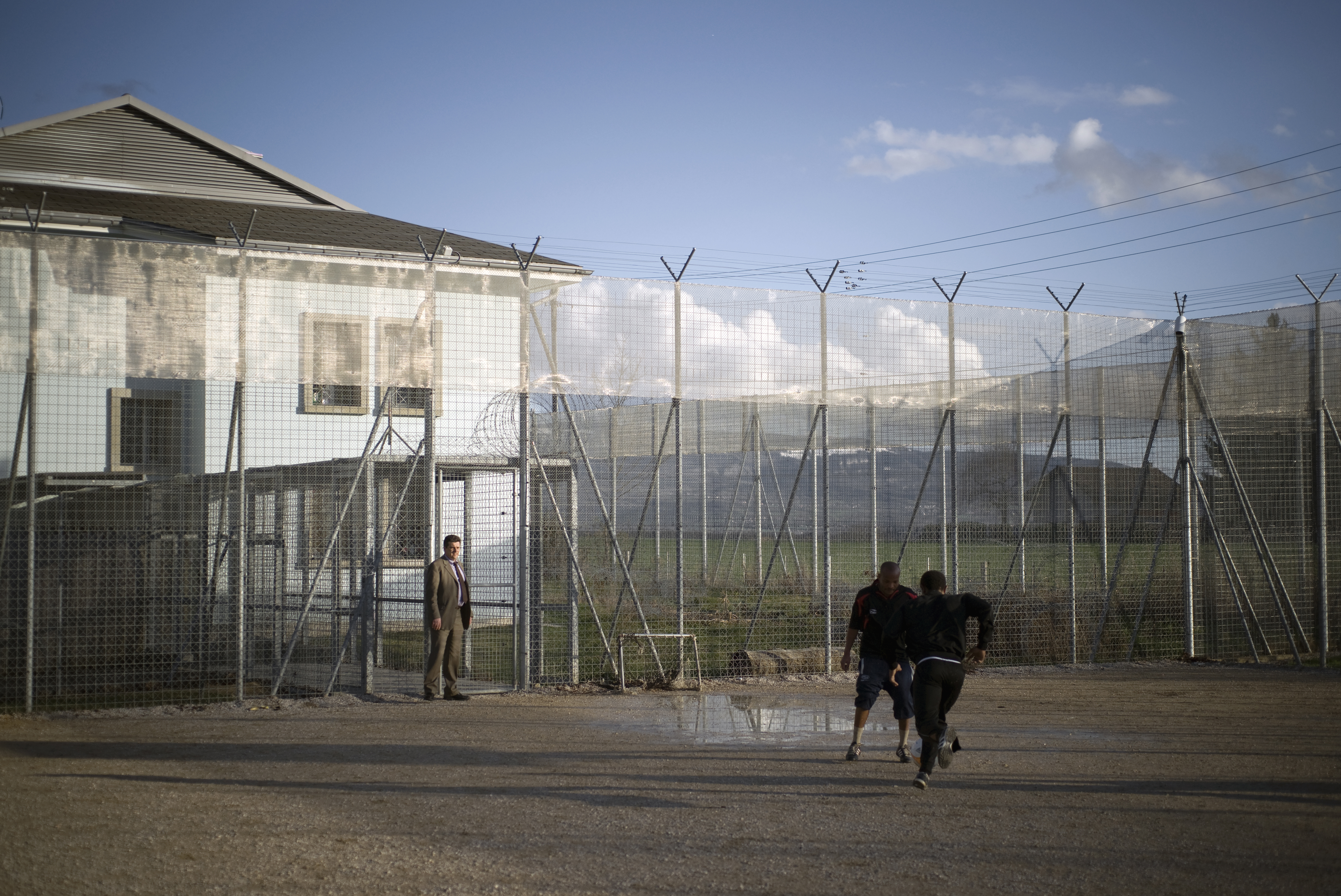 Le directeur Jean-Michel Claude, protagoniste du film « Vol Spécial » de Fernand Melgar, surveille les détenus de la prison de Frambois à Genève.